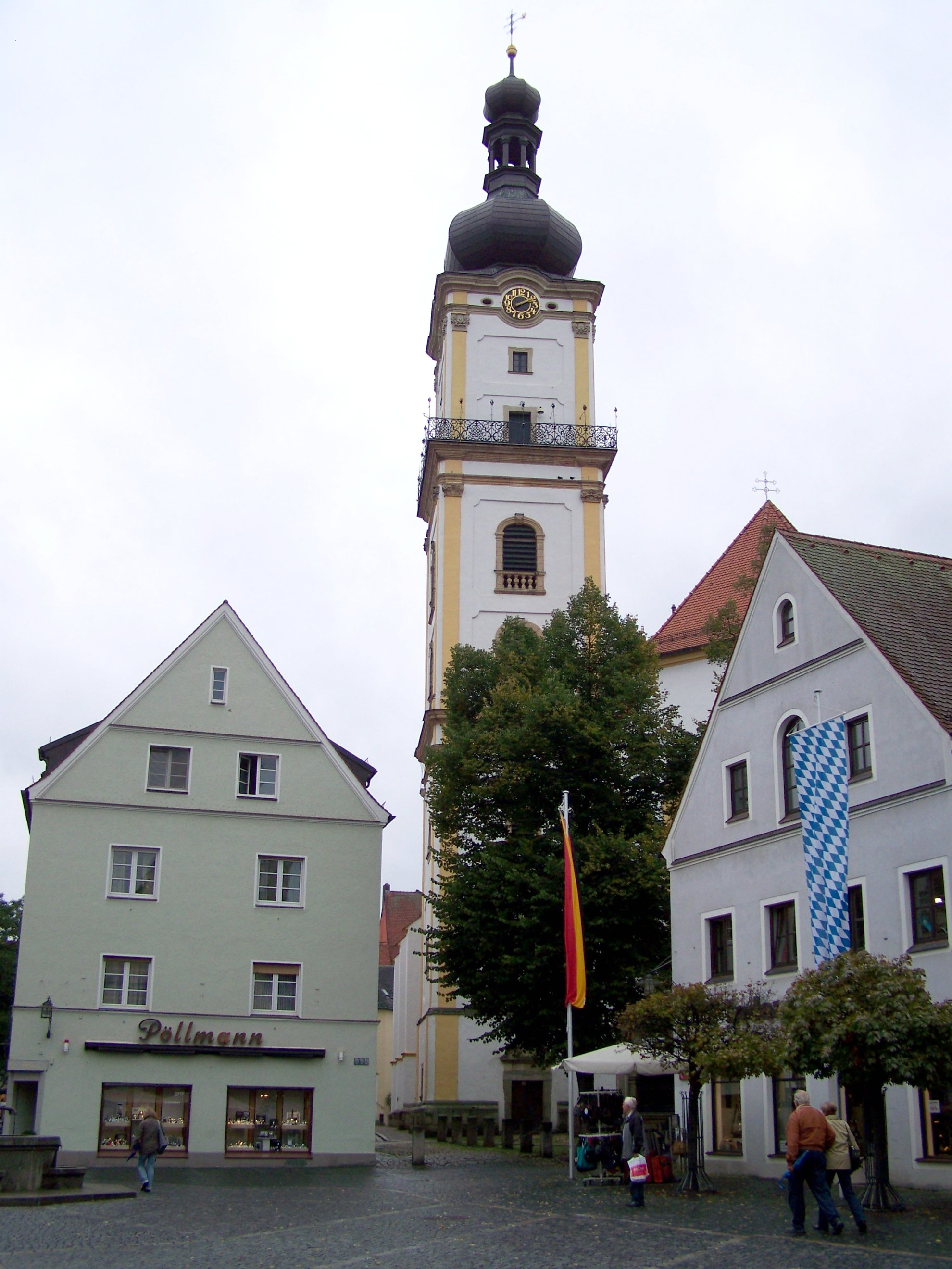 Weiden - Kirche St. Michael